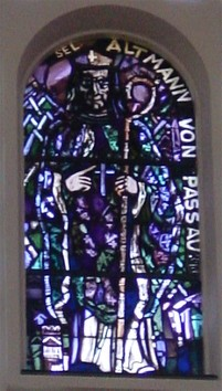 Kirchenfenster von Altmann von Passau in der Pfarrkirche Liesing von Martin Häusle